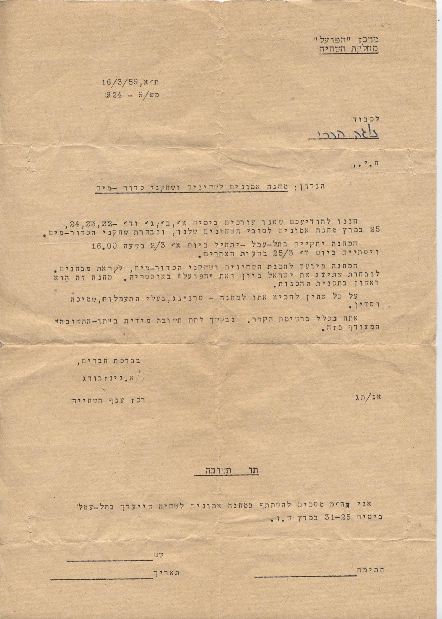 הזמנה לאימוני נבחרת השחייה מרץ 1959